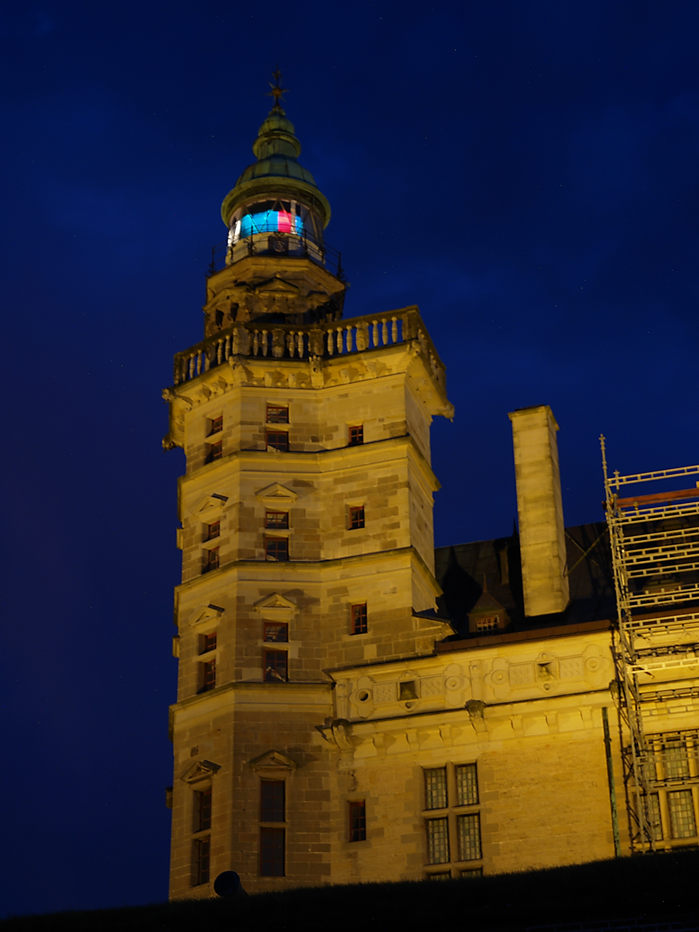 Leuchtfeuer im nordöstlichen Turm des Schlosses Kronborg in Helsingör, Dänemark